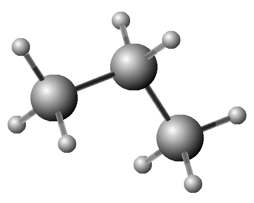 Prostorová geometrie molekuly propanu